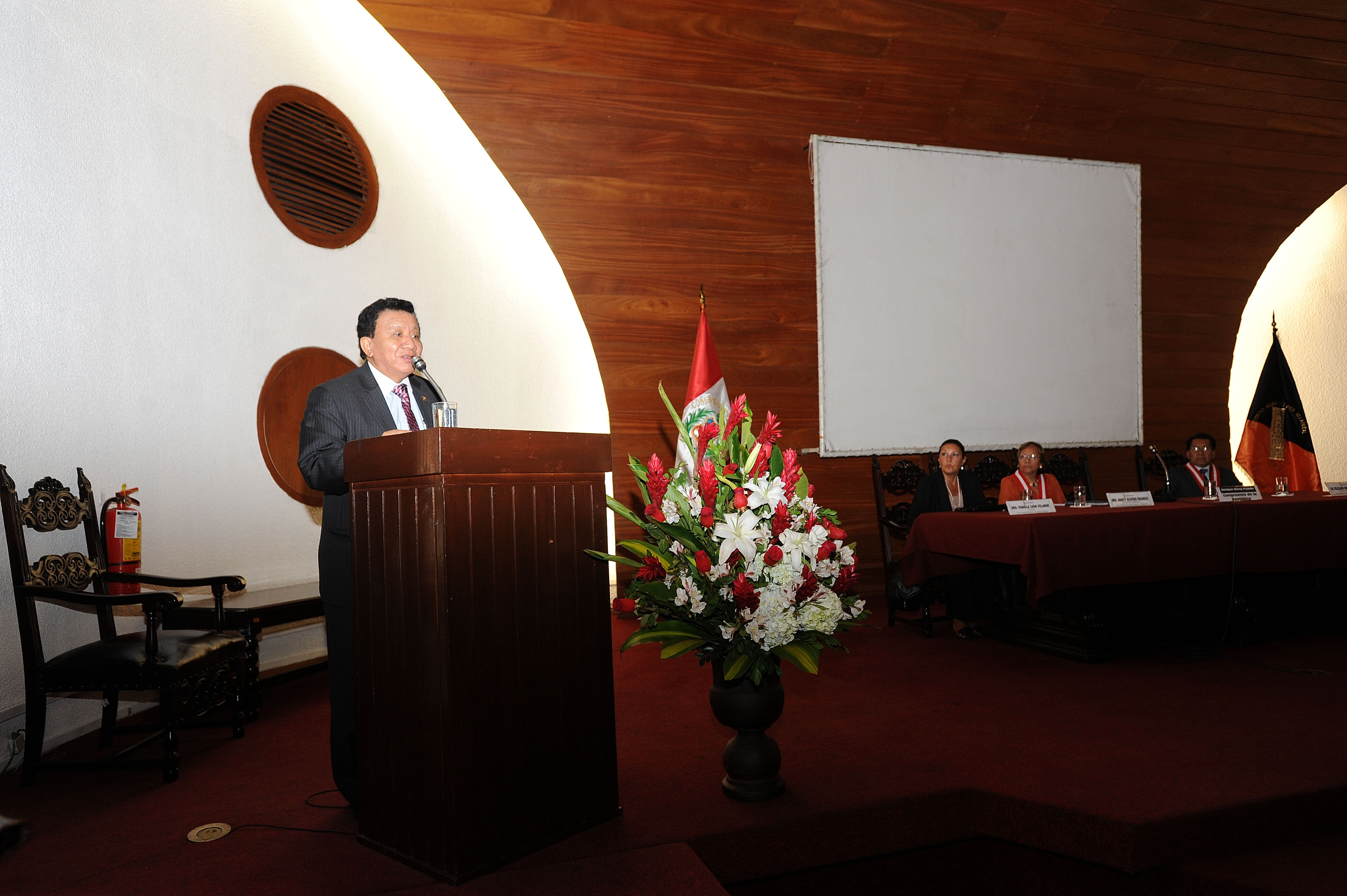 Una conferencia que tuvo como tema central los vicerrectorados de investigación universitaria se realizó hoy en el auditorio Sánchez Carrión del Poder Legislativo. Fue organizada por la Comisión de Ciencia, Innovación y Tecnología, que preside el congresista Pedro Spadaro Philipps. La inauguró el parlamentario Enrique Wong Pujada.